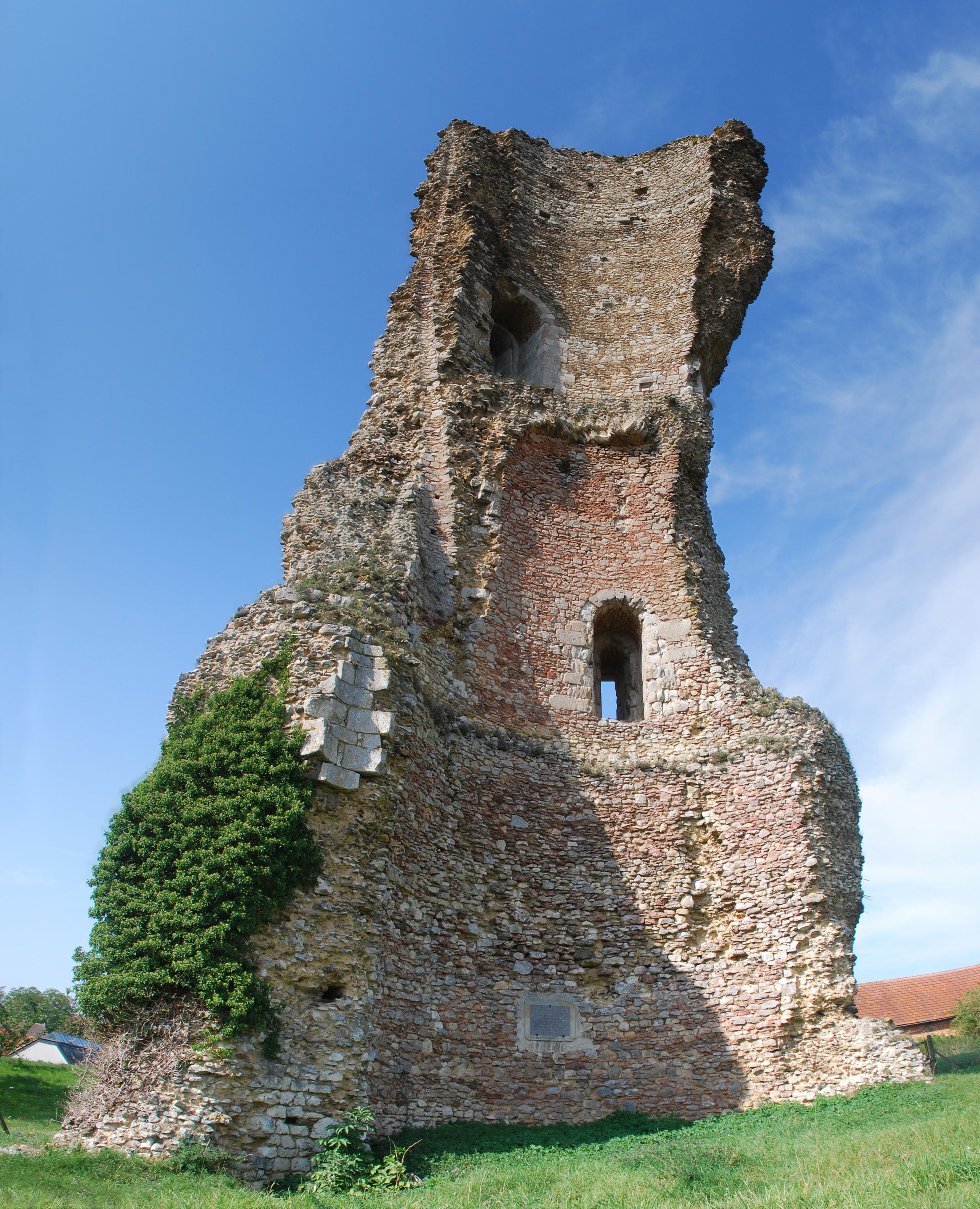 tour de l’Épaule, Gallardon, Eure-et-Loir (France). .